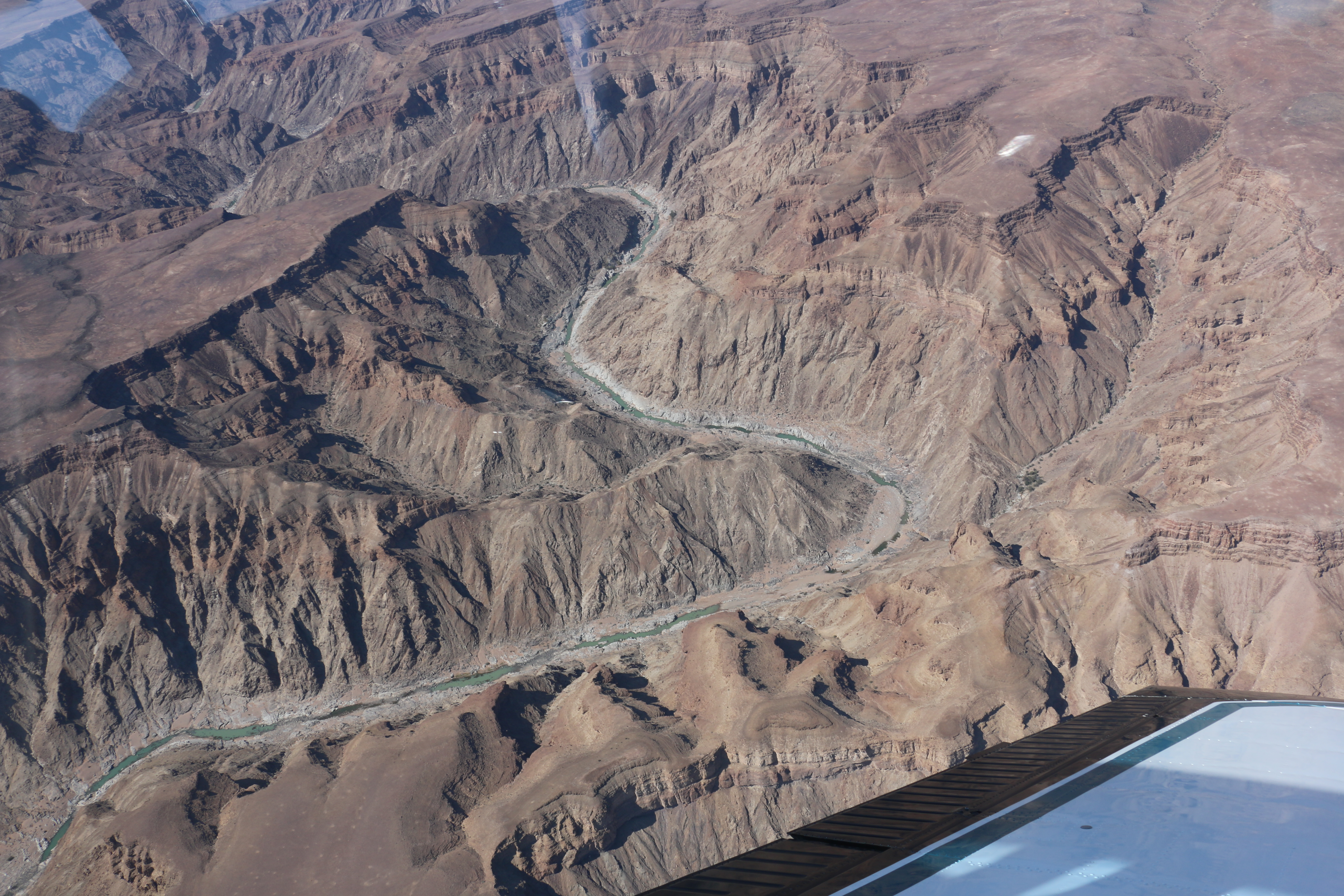 Flug ca. 700 Meter über dem Fish River Canyon. Flugzeug Beechcraft Bonanza A36